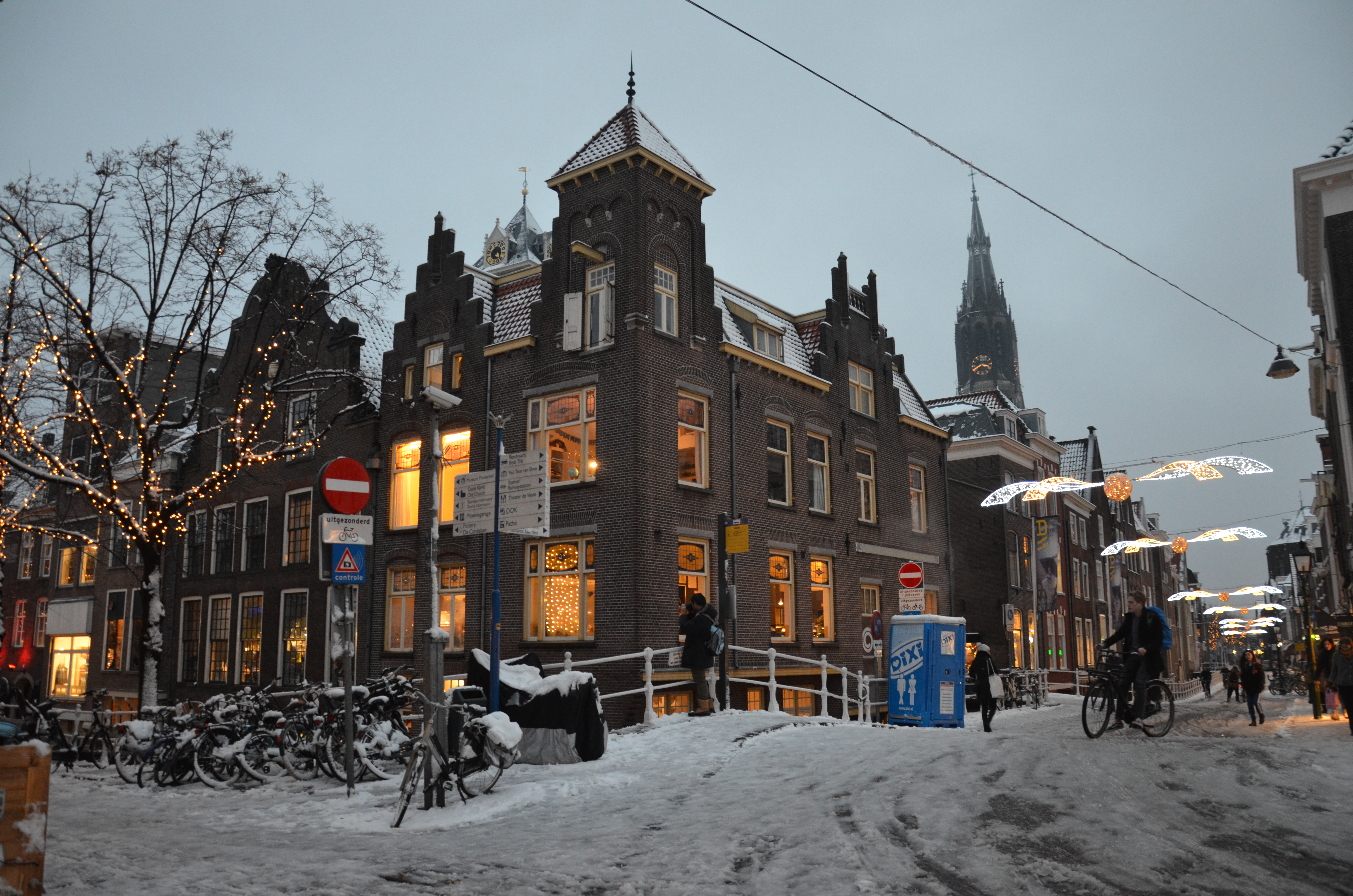 De Oude Langendijk in Delft bij winterse weersomstandigheden.